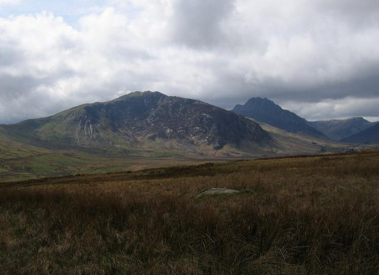 Gallt yr Ogof and Tryfan from Creigiau Gleision